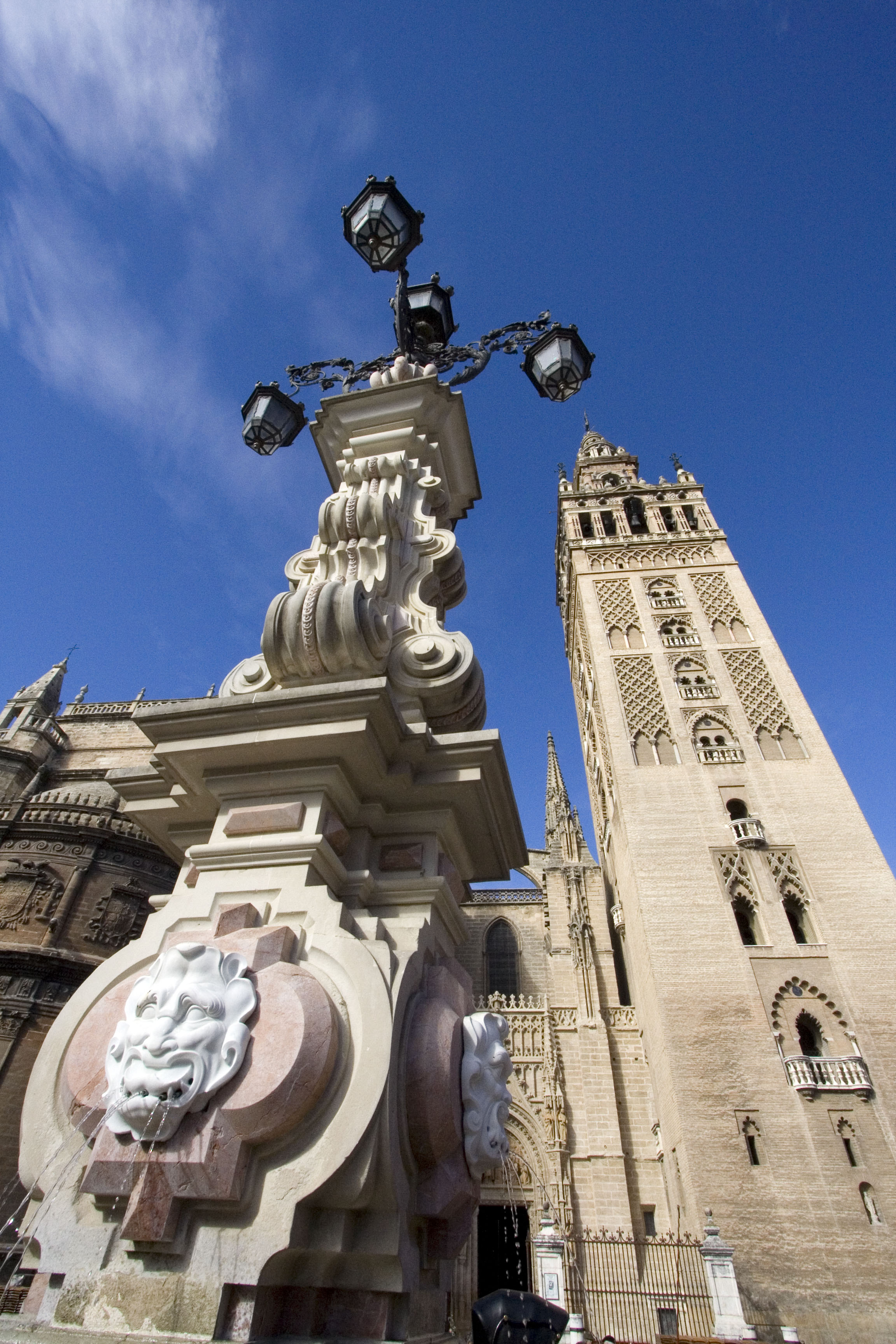 Torre de la Giralda - Plaza Virgen de los Reyes - Sevilla